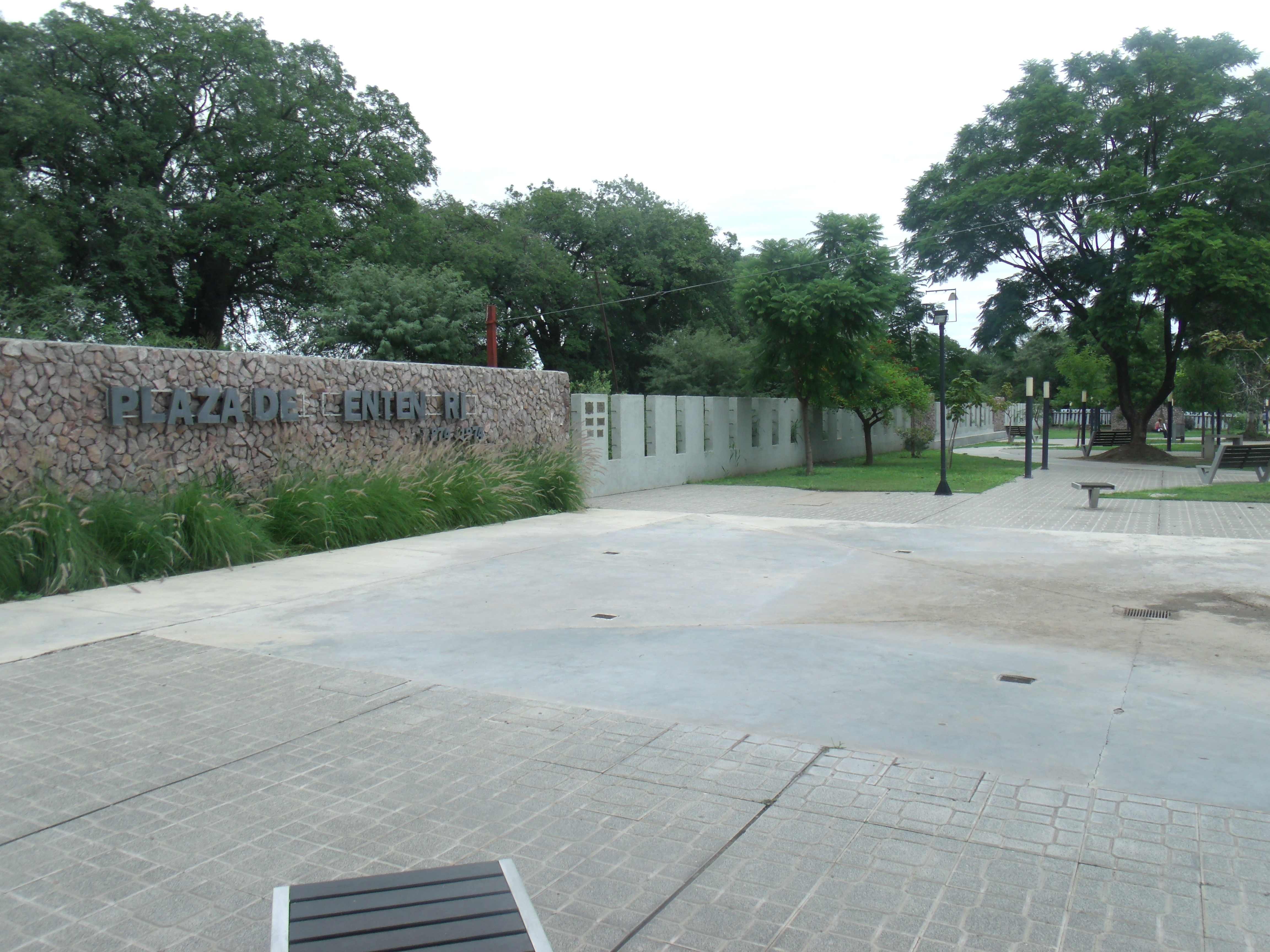 Plaza del Centenario en Frías junto a las vías del ferrocarril